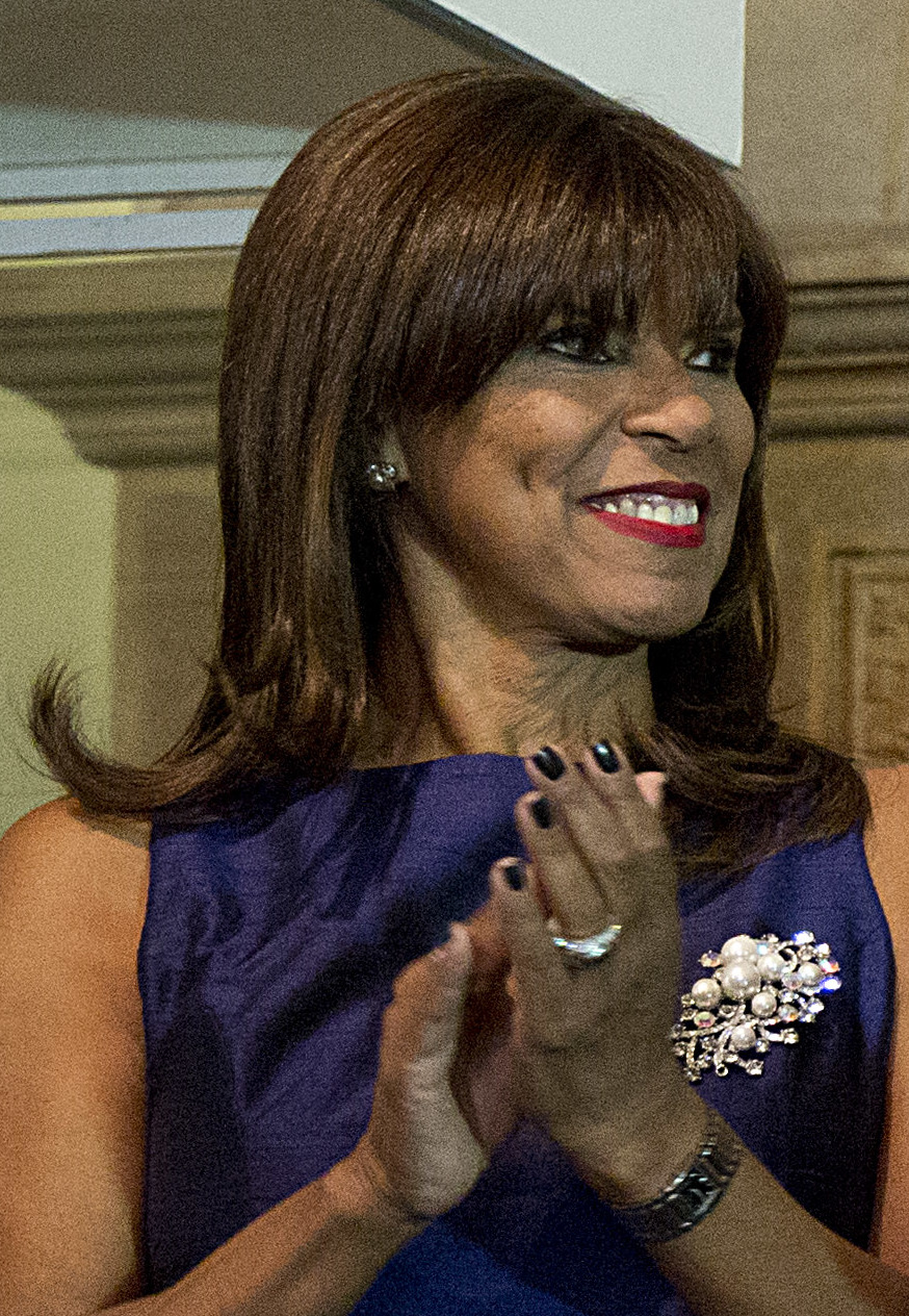 Buenos Aires, 7 de mayo 2015. Con motivo del 96.º aniversario del nacimiento de Eva Perón. el Museo Evita invitó a las actrices que interpretaron a Evita en cine, teatro y televisión durante estos años. Encabezaron el encuentro Teresa Parodi (ministra de Cultura de la Nación), Mariano Recalde (presidente de Aerolíneas Argentinas), Cristina Álvarez Rodríguez (presidenta del Instituto Nacional de Investigaciones Históricas) y las actrices Anamá Ferreira, Nacha Guevara, Cristina Banegas y Andrea del Boca. Fotos: Silvina Frydlewsky / Ministerio de Cultura de la Nación.